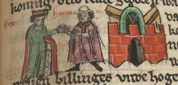 Sächsischen Weltchronik, Forschungsbibliothek Gotha, Cod. Memb. I 90, fol. 89r